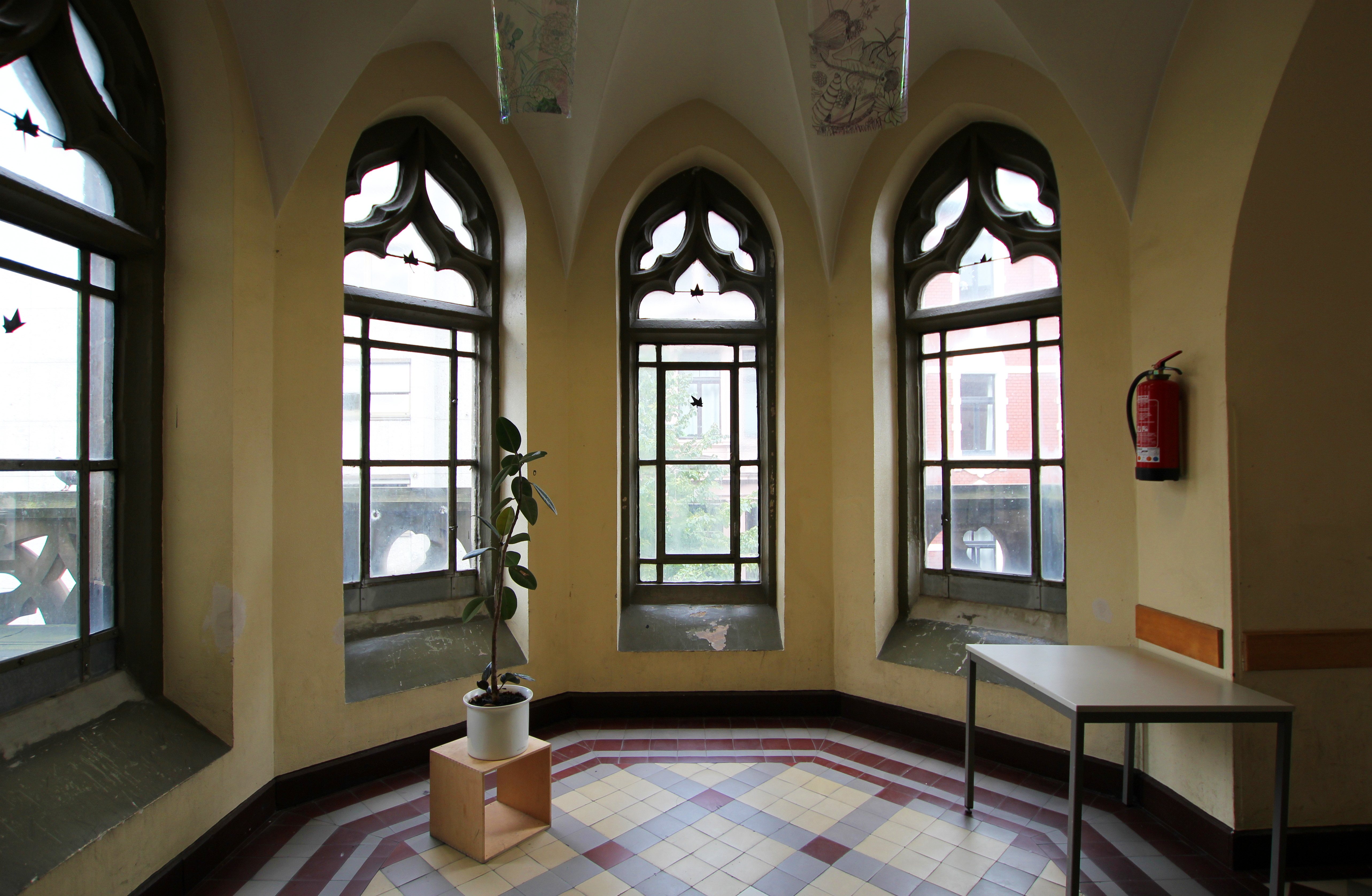 Köln-Neustadt-Nord, Hansagymnasium Hansaring 54-58 This is a photograph of an architectural monument.